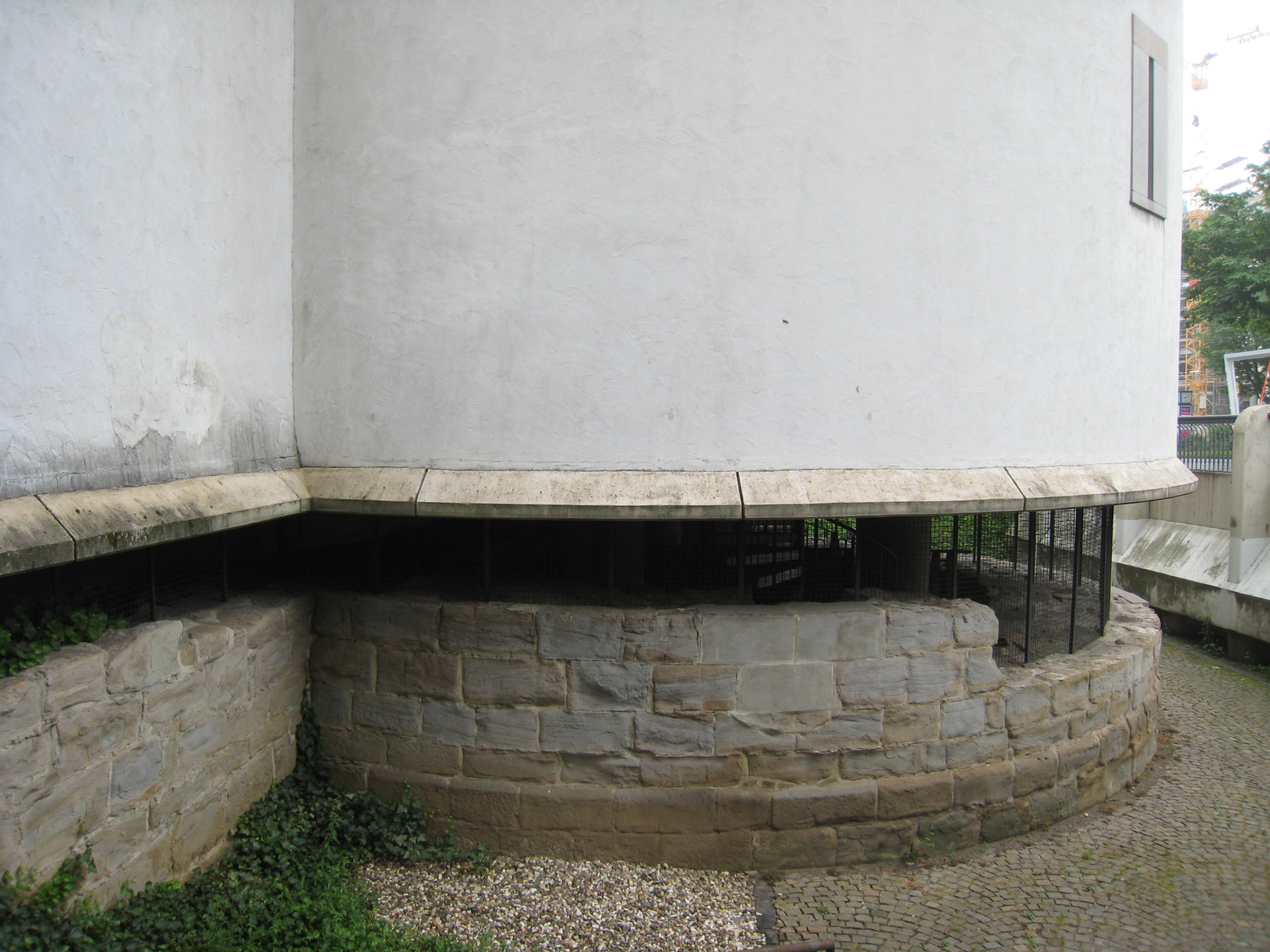 Die denkmalgeschützten Fundamente des historischen Adlertum in Dortmund